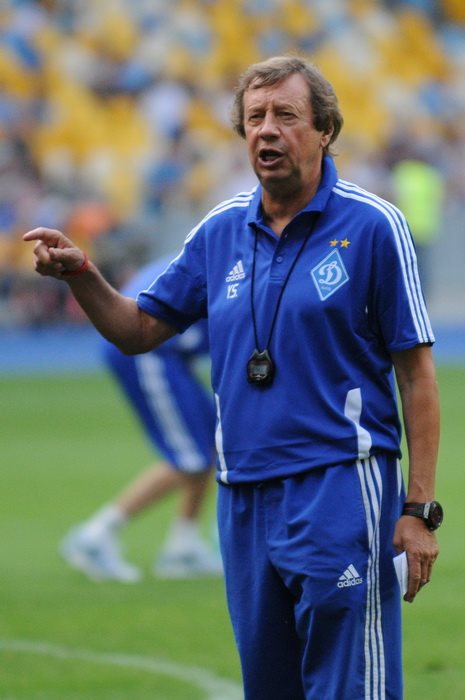 Открытая тренировка Динамо